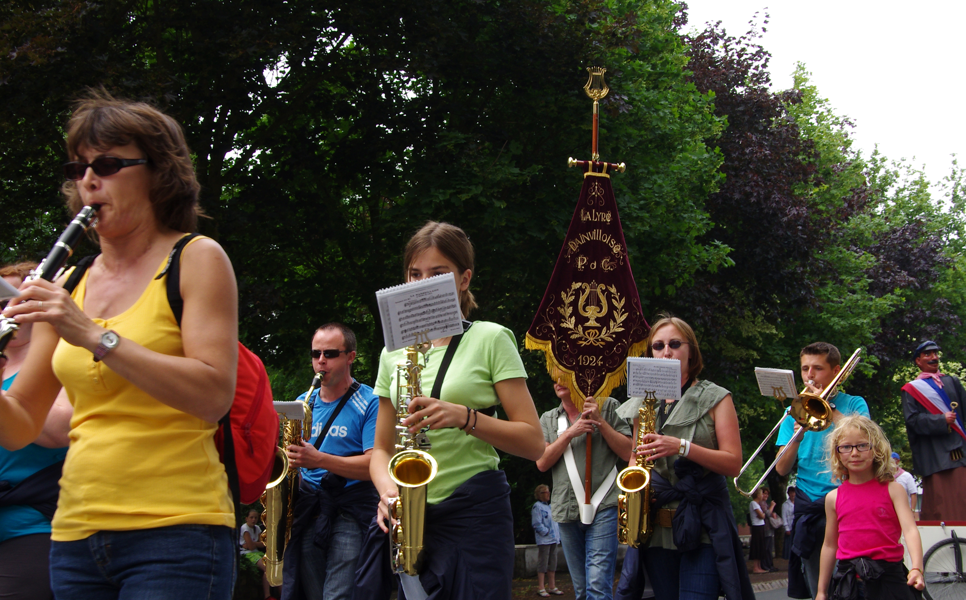 Sainte-Catherine-lès-Arras (Pas-de-Calais, France) - Animation festive avec défilé de géants, un dimanche de juin. Le départ a eu lieu route de Béthune, depuis le parking du supermarché "Intermarché". Les musiciens de La Lyre Dainvilloise précèdent le géant "Tiot Mitt". .